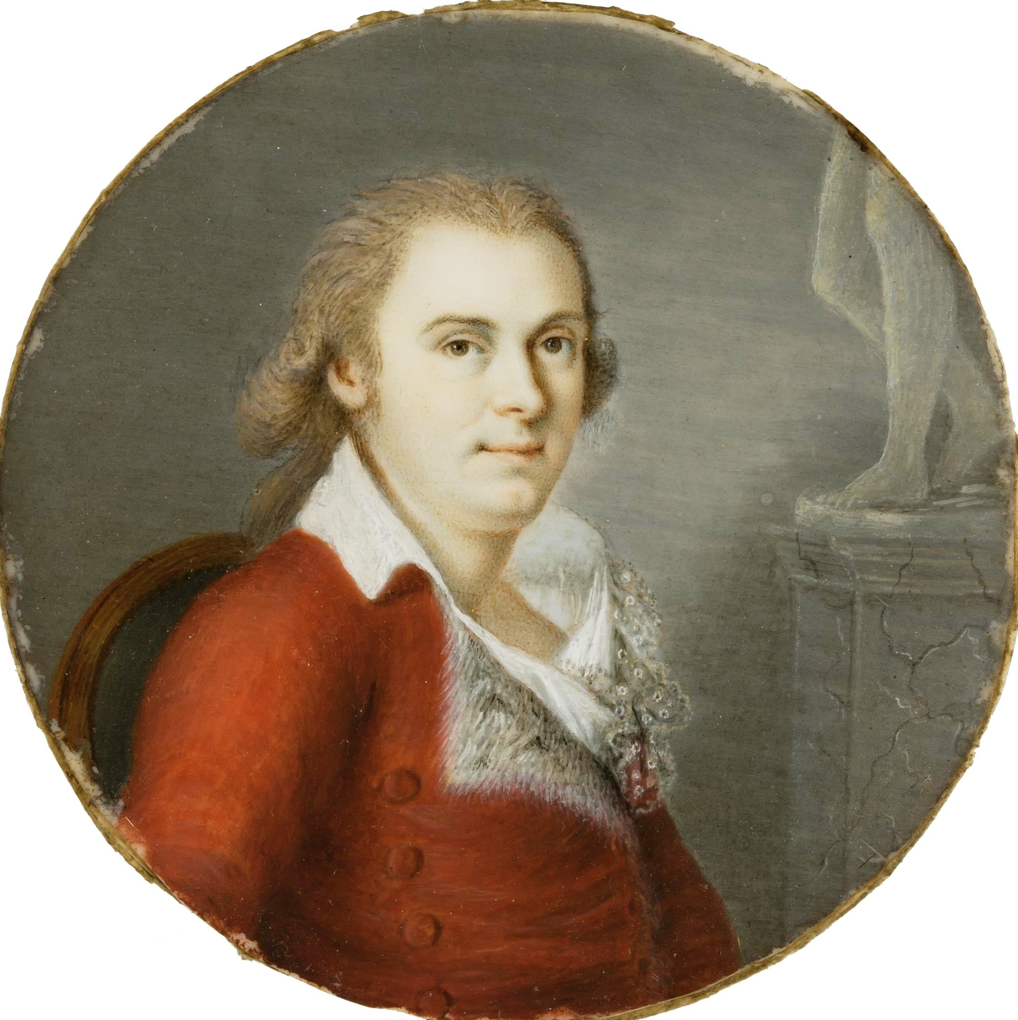 Retrato del político español Mariano Luis de Urquijo (1769-1817).